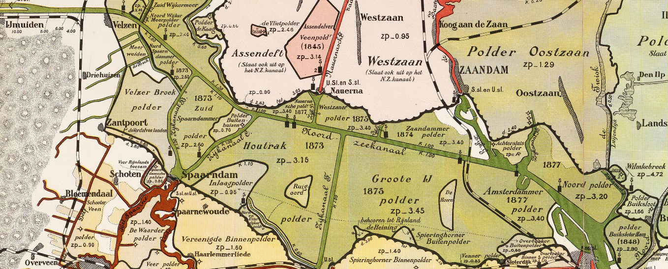 IJpolders